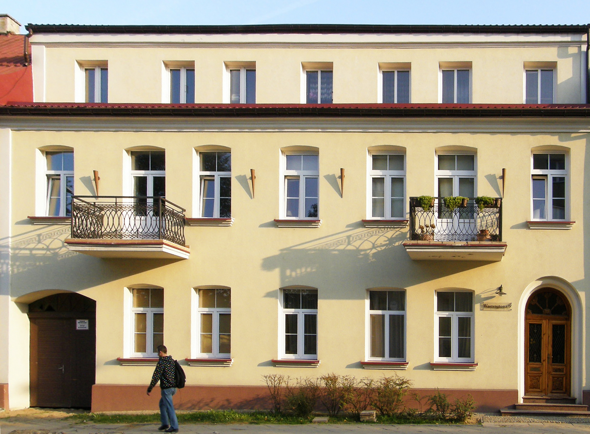 Białystok, ul. Waszyngtona 9 - kamienica (zabytek nr A-277 z 10.1985)